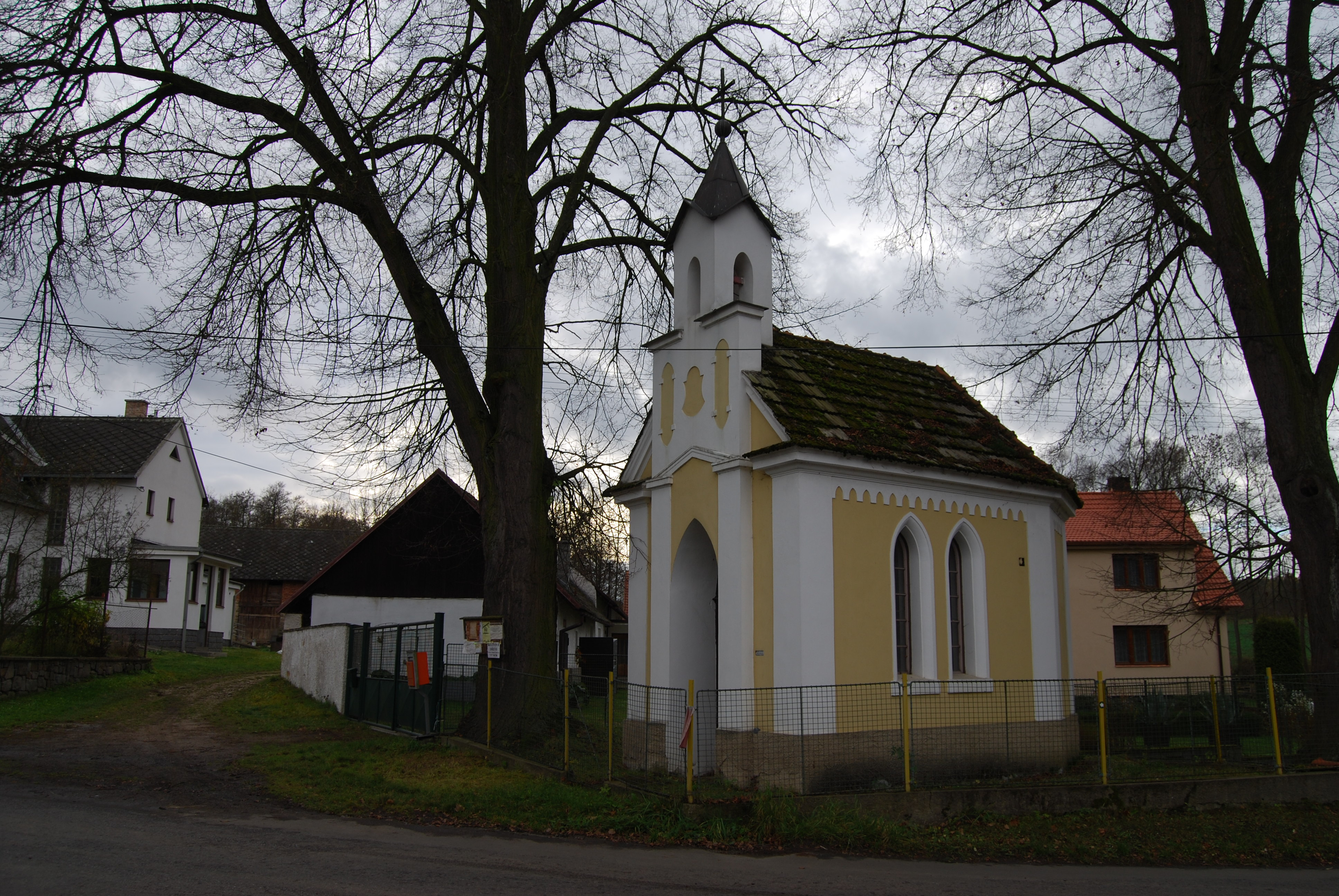 Pohled na část vesnice a kapli. Koubalova Lhota je malá vesnice, část obce Klučenice v okrese Příbram. Česká republika.